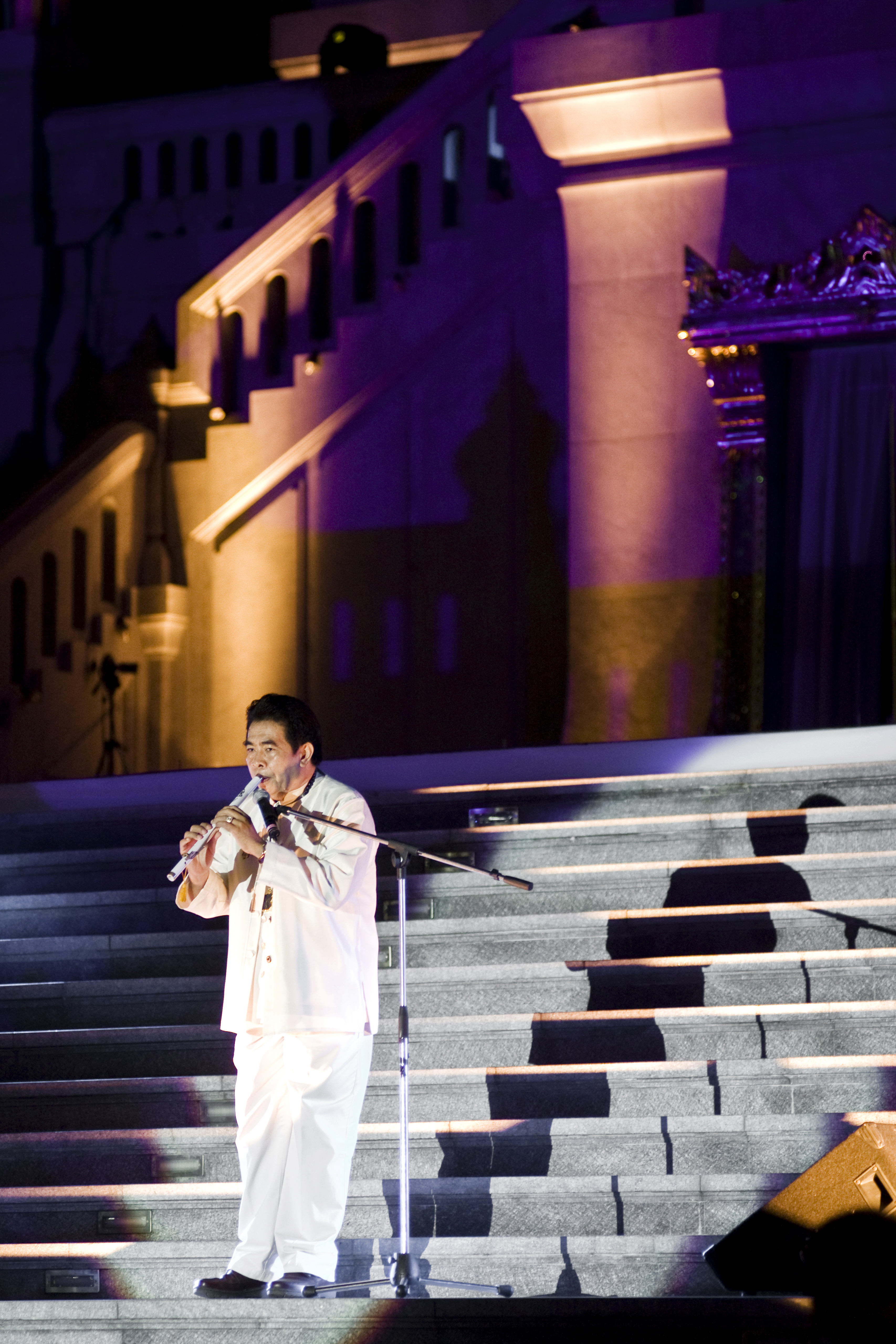 นายกรัฐมนตรี ร่วมงานพิธีสมโภชพระมหามณฑปประดิษฐานพระพุทธมหาสุวรรณปฏิมากร ณ วัดไตรมิตรวิทยาราม 28ธันวาคม2552 (The Official Site of The Prime Minister of Thailand Photo by พีรพัฒน์ วิมลรังครัตน์)